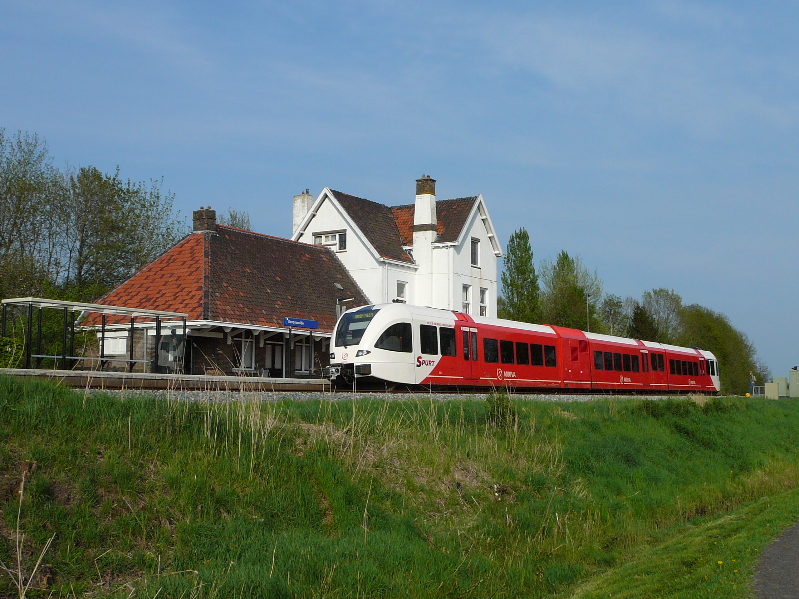 Spurt 308 onderweg van Nieuweschans naar Groningen in Kropswolde